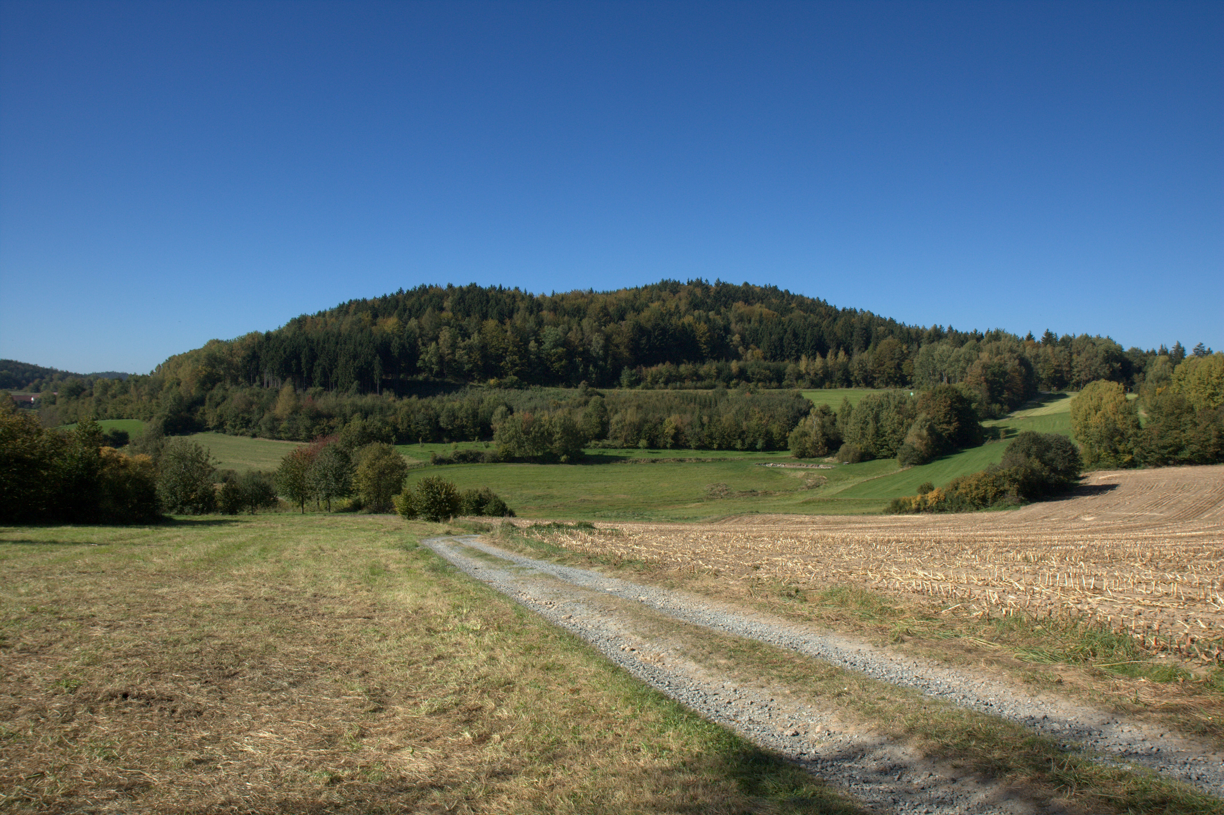 Burgstall Altenthannstein - Ansicht ds Alten Tannsteines aus östlicher Richtung